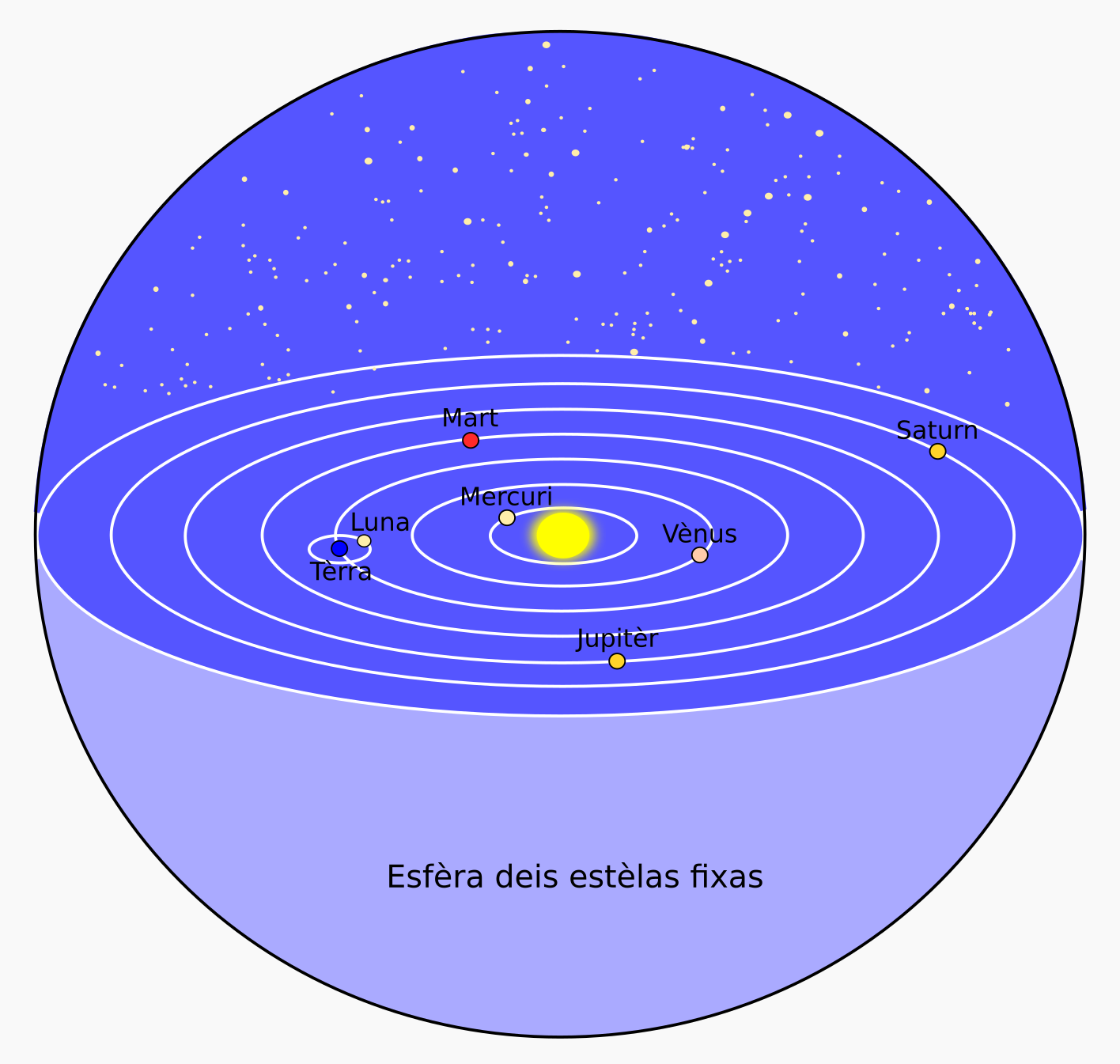 Modèl d'Univèrs de Copernic.